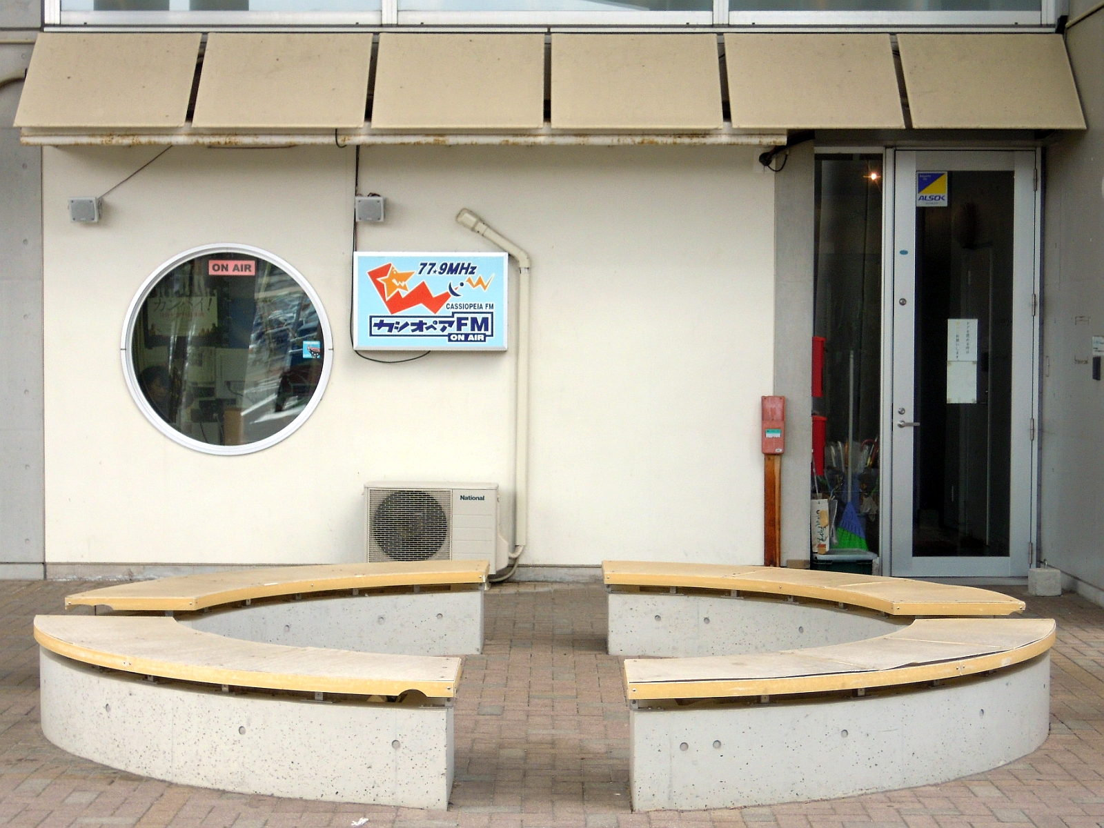 岩手県二戸市のカシオペアメッセ・なにゃーと1階にあるカシオペアFMのスタジオ外景